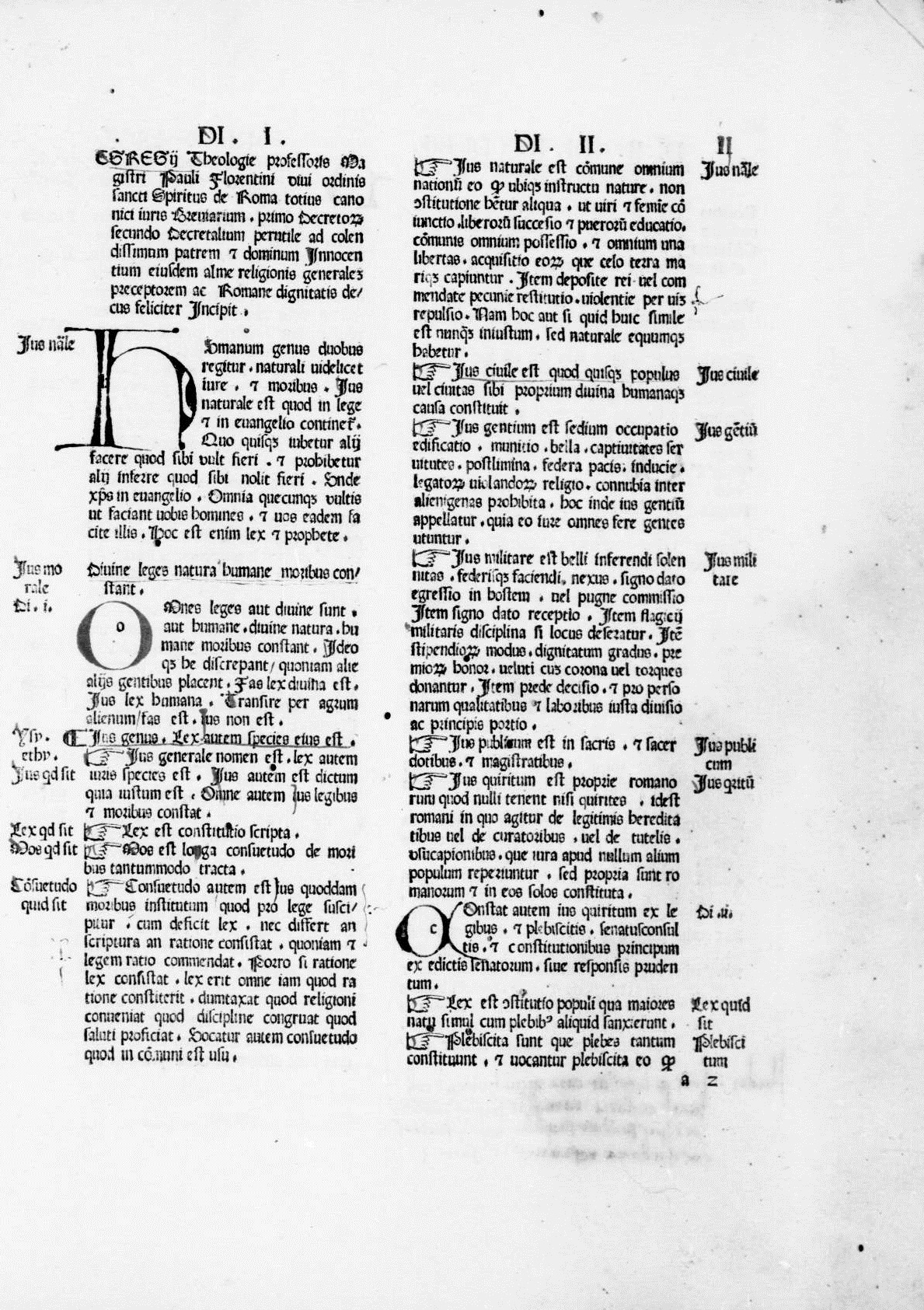 Carta a2r